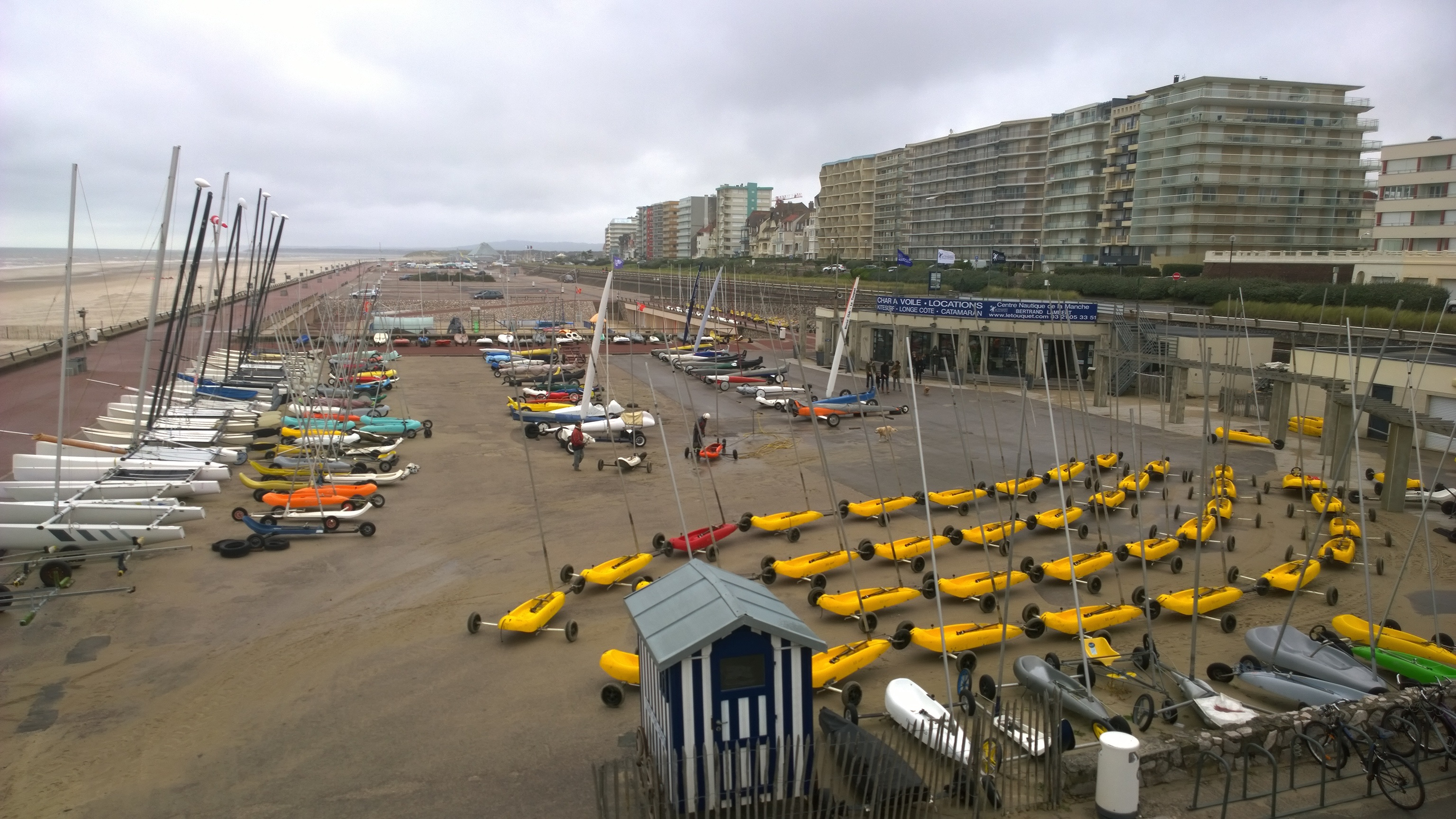 Plage du Touquet